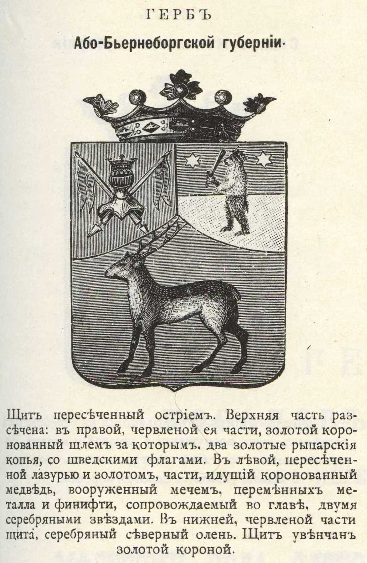 Official Russian Empire coat of arms Abo-Bjerneborg Governorate. Герб Або-Бьёрнеборгской губернии Российской Империи Великого Княжества Финляндского с официальным описанием в Гербовнике Винклера.